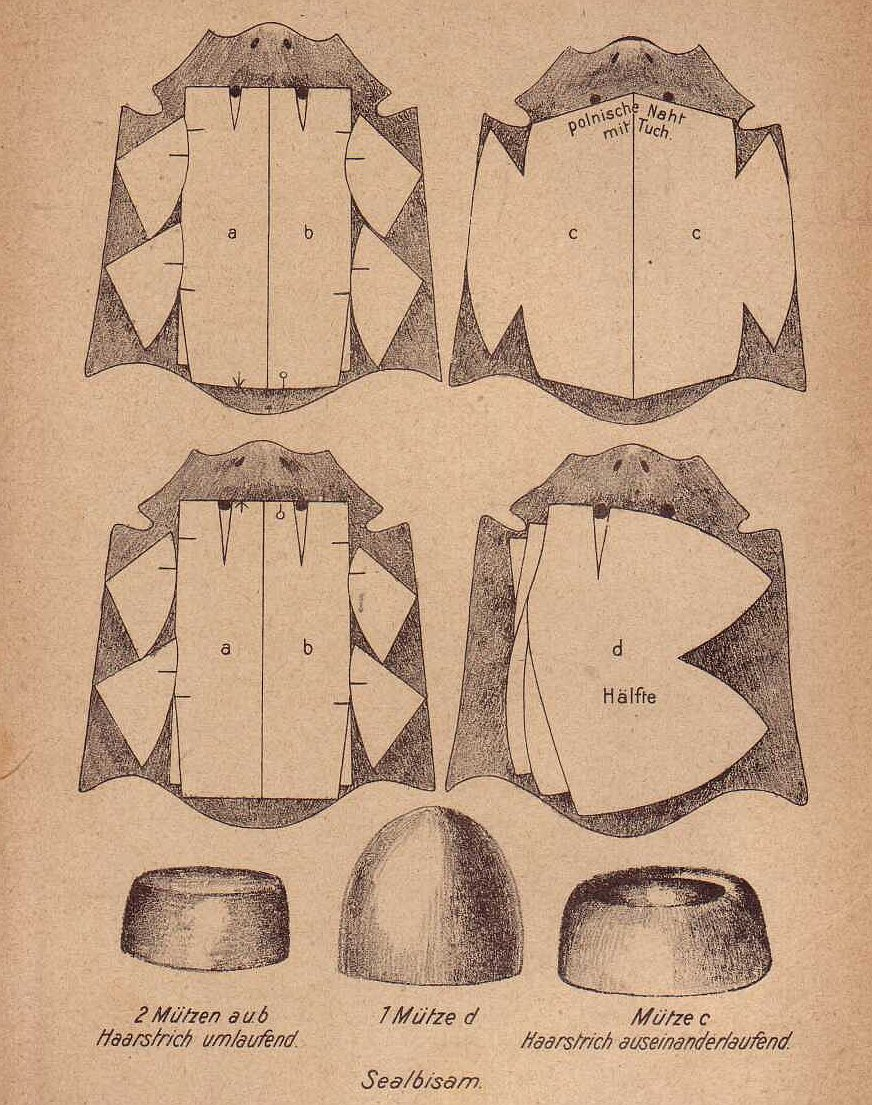 Graphics for Furriers (Ausschnitt)